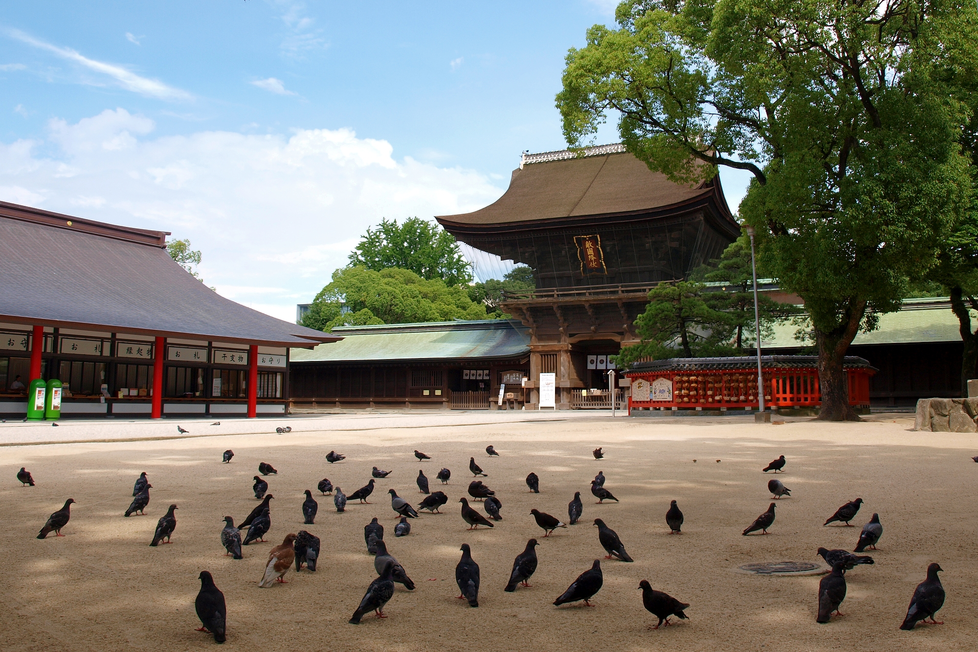 福岡県福岡市東区の筥崎宮境内